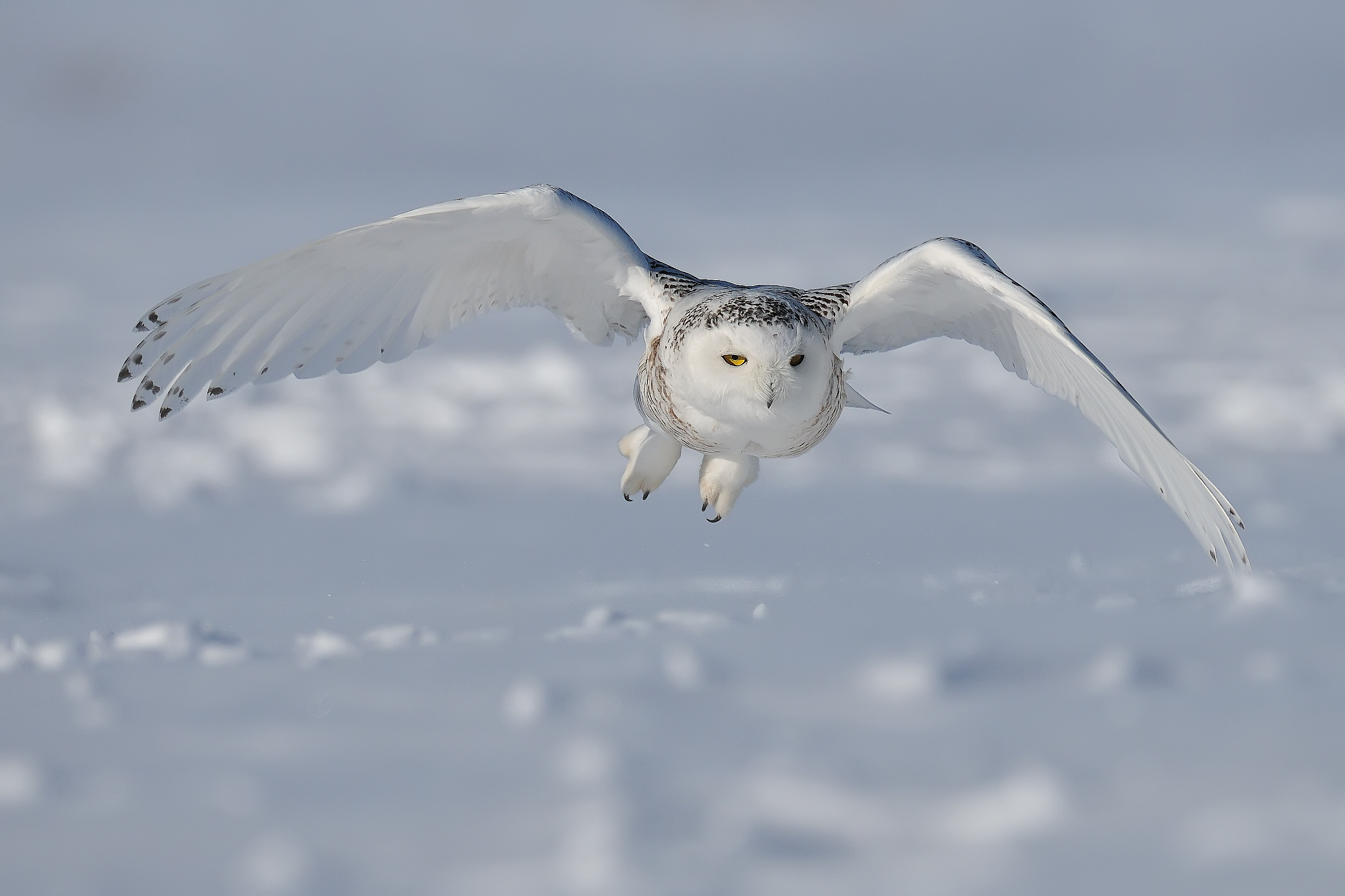 Français cadien: Snowy-owl